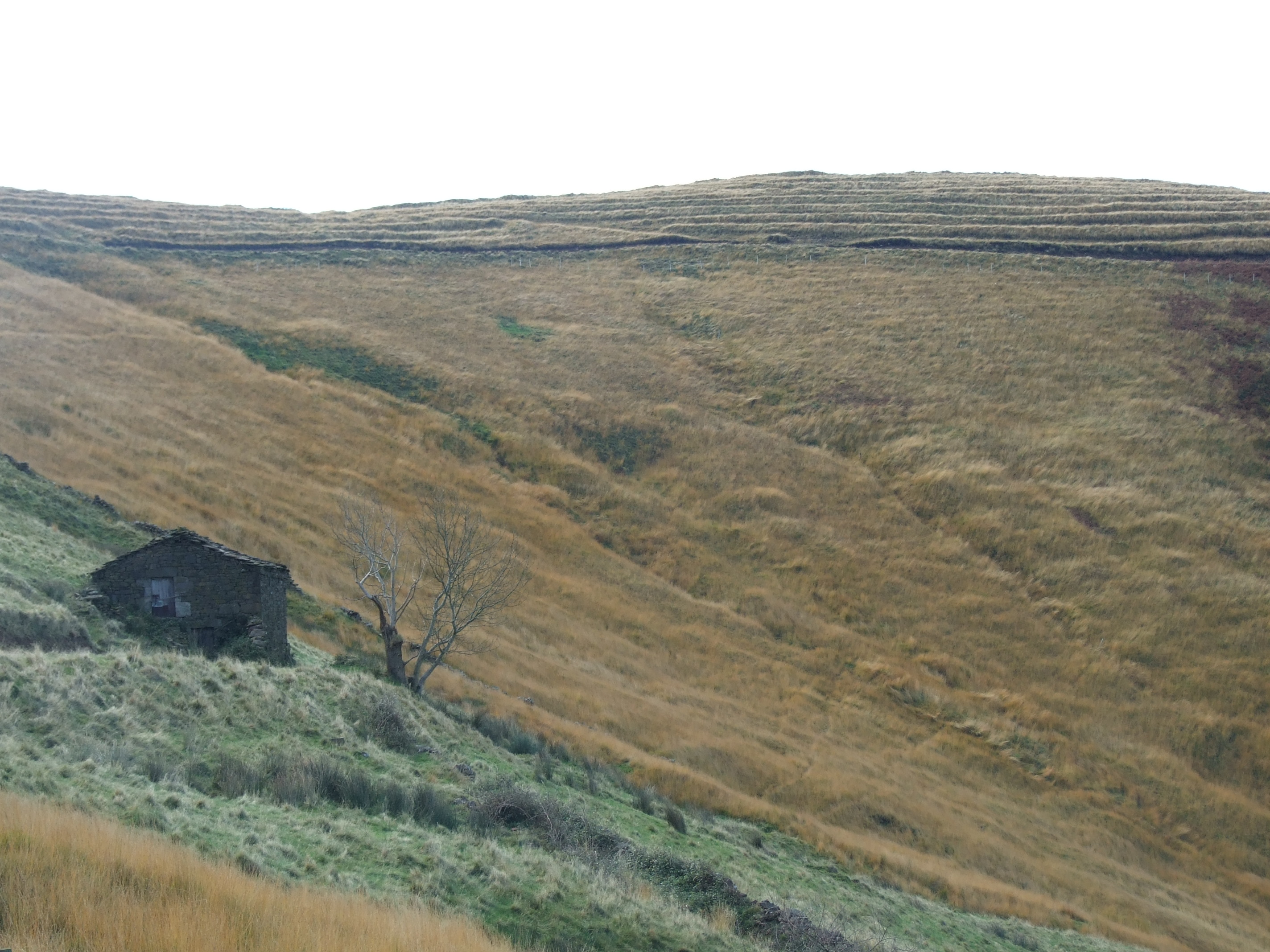 Cabaña durante la ruta de los Cabañales de Pisueña.